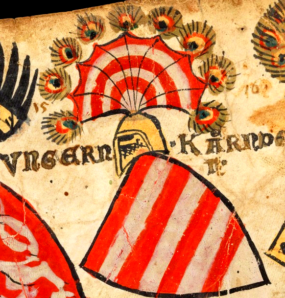 Die wappenrolle von Zürich. Az Anjouk korából fennmaradt színes címeres emlék az 1345-ből való zürichi címertekercsen. Imre és II. Endre magyar királyok címerpajzsa, amelyben vörössel és fehérrel (ezüsttel) váltakoznak a csíkok. A kezdő szín a legrégibb címeres emlékeken a vörös, a csíkok száma pedig legtöbbször nyolc